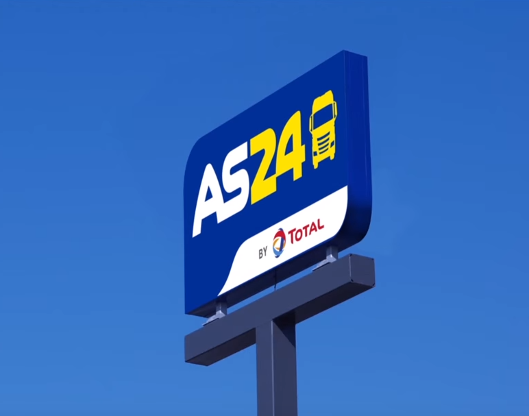 Panneau de station AS 24